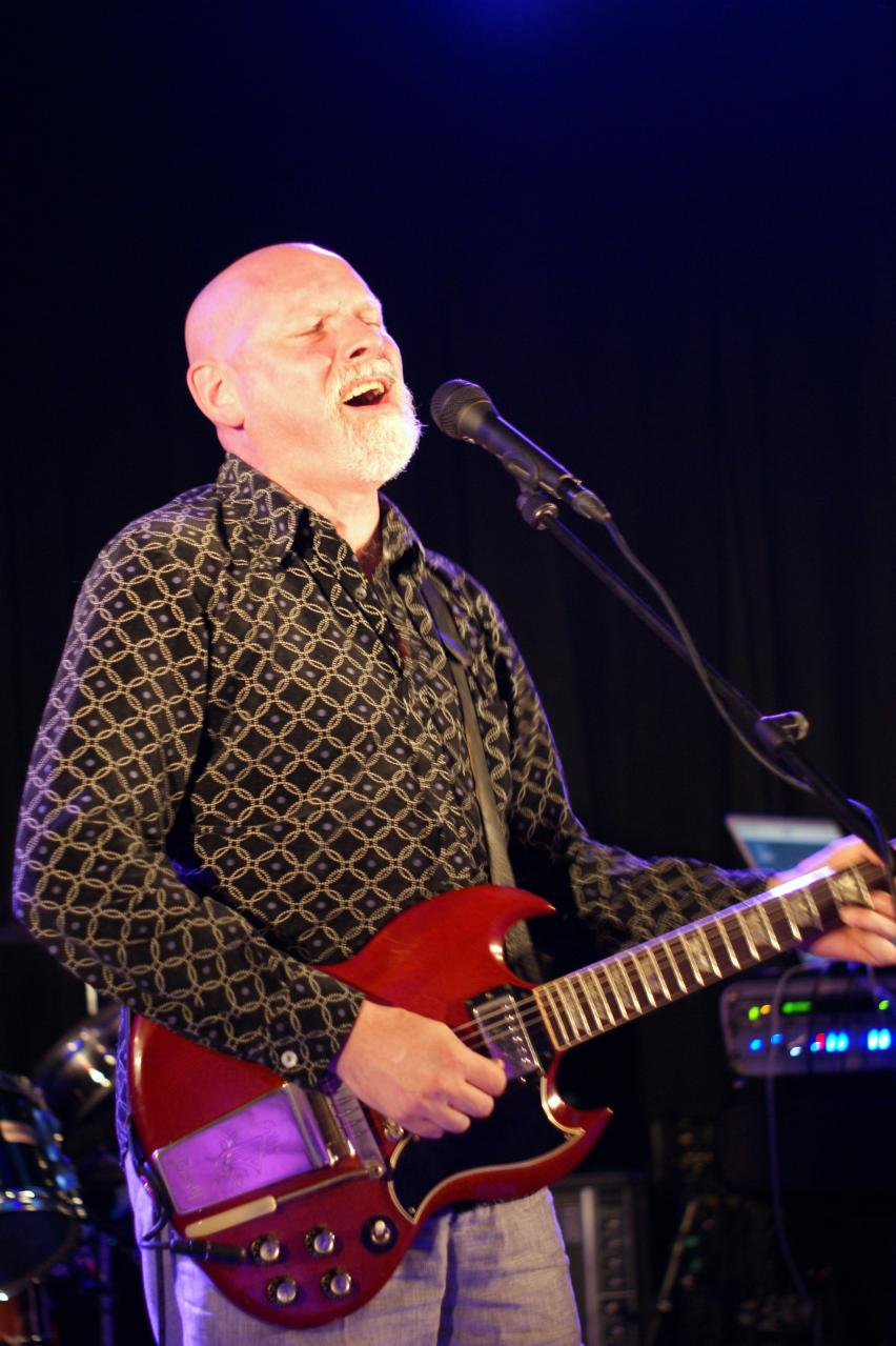 Live @ Dom Church, Utrecht.